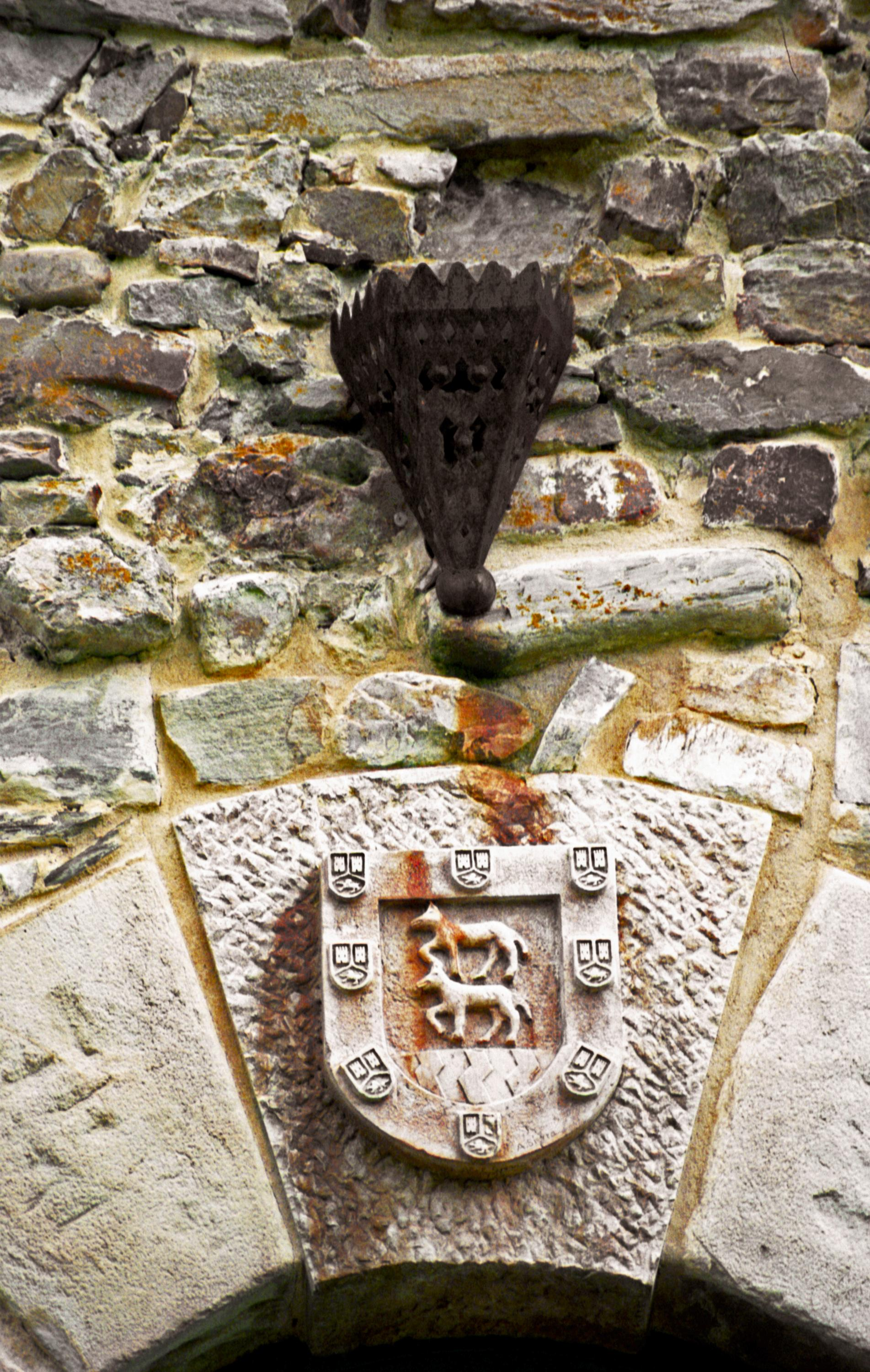 Turienzo de los Caballeros, Castile-Leon (3)